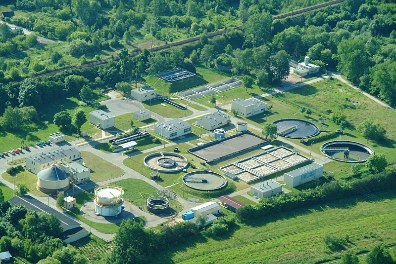 Oczyszczalnia ścieków w Mińsku Mazowieckim. W tle linia kolejowa nr 13.